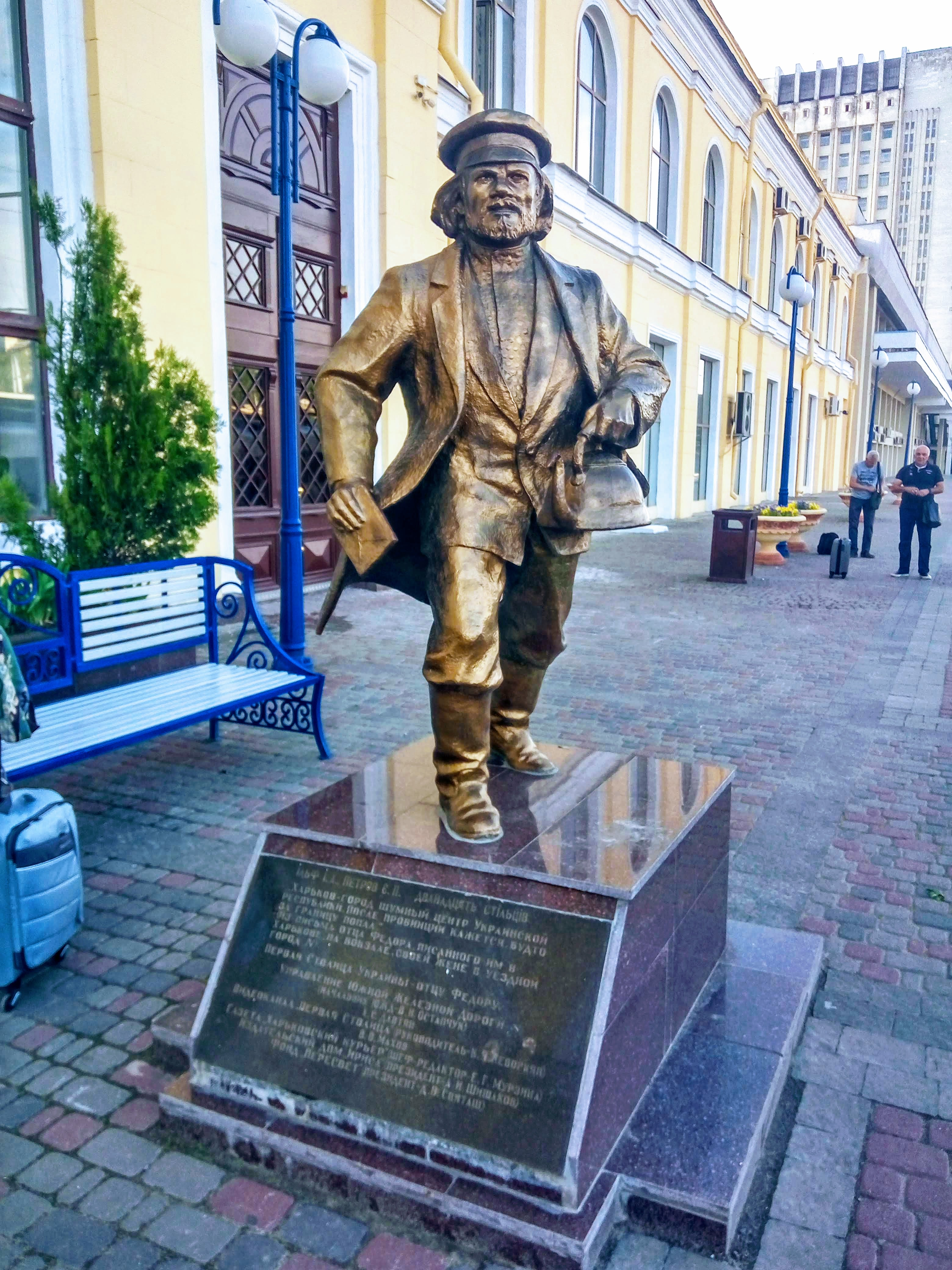 Скульптура отца Фёдора из романа «Двенадцать стульев» Ильфа и Петрова